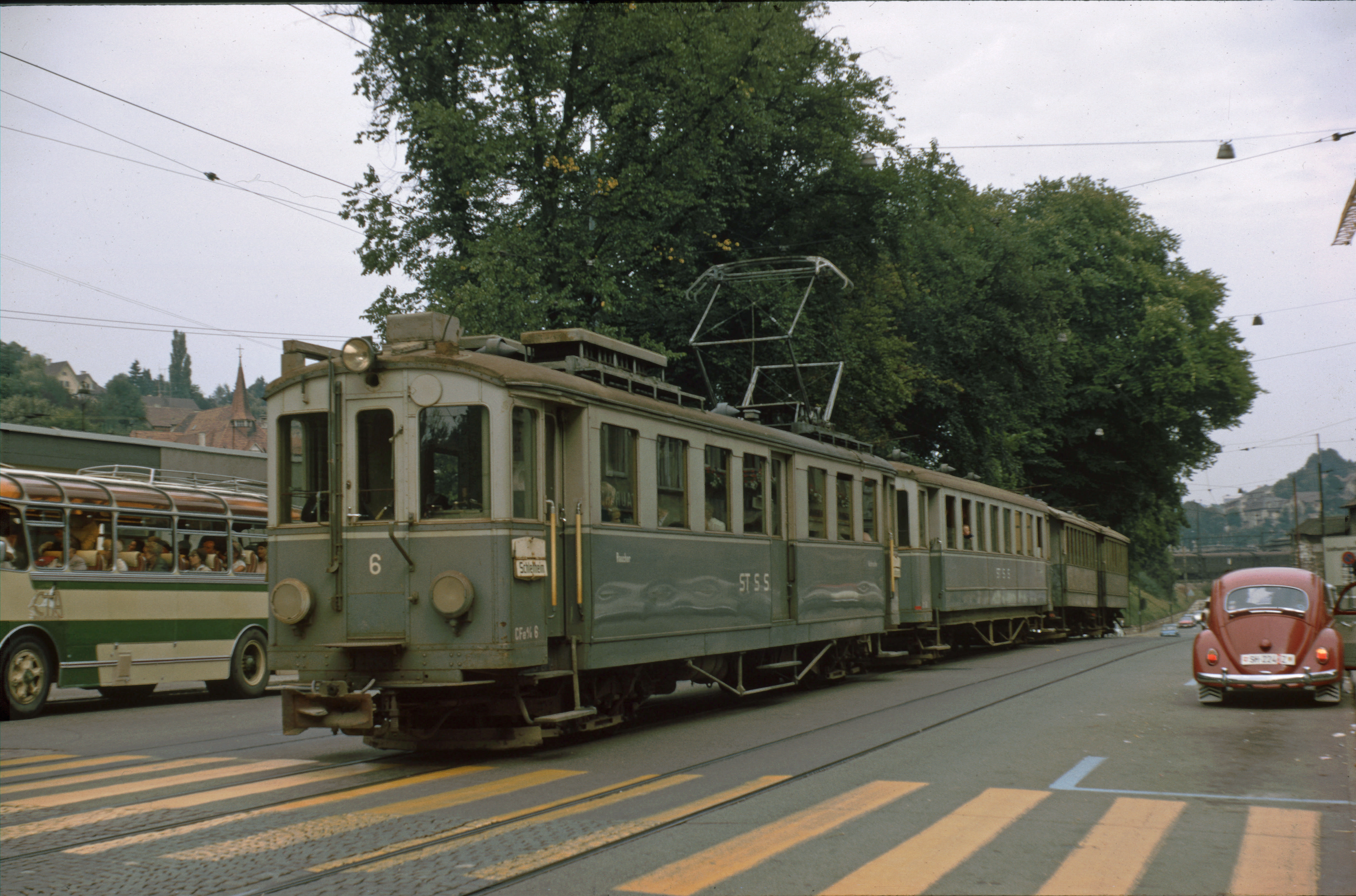 Strassenbahn Schaffhausen Schleitheim im Bahnhof Schaffhausen abfahrbereit Richtung Schleitheim